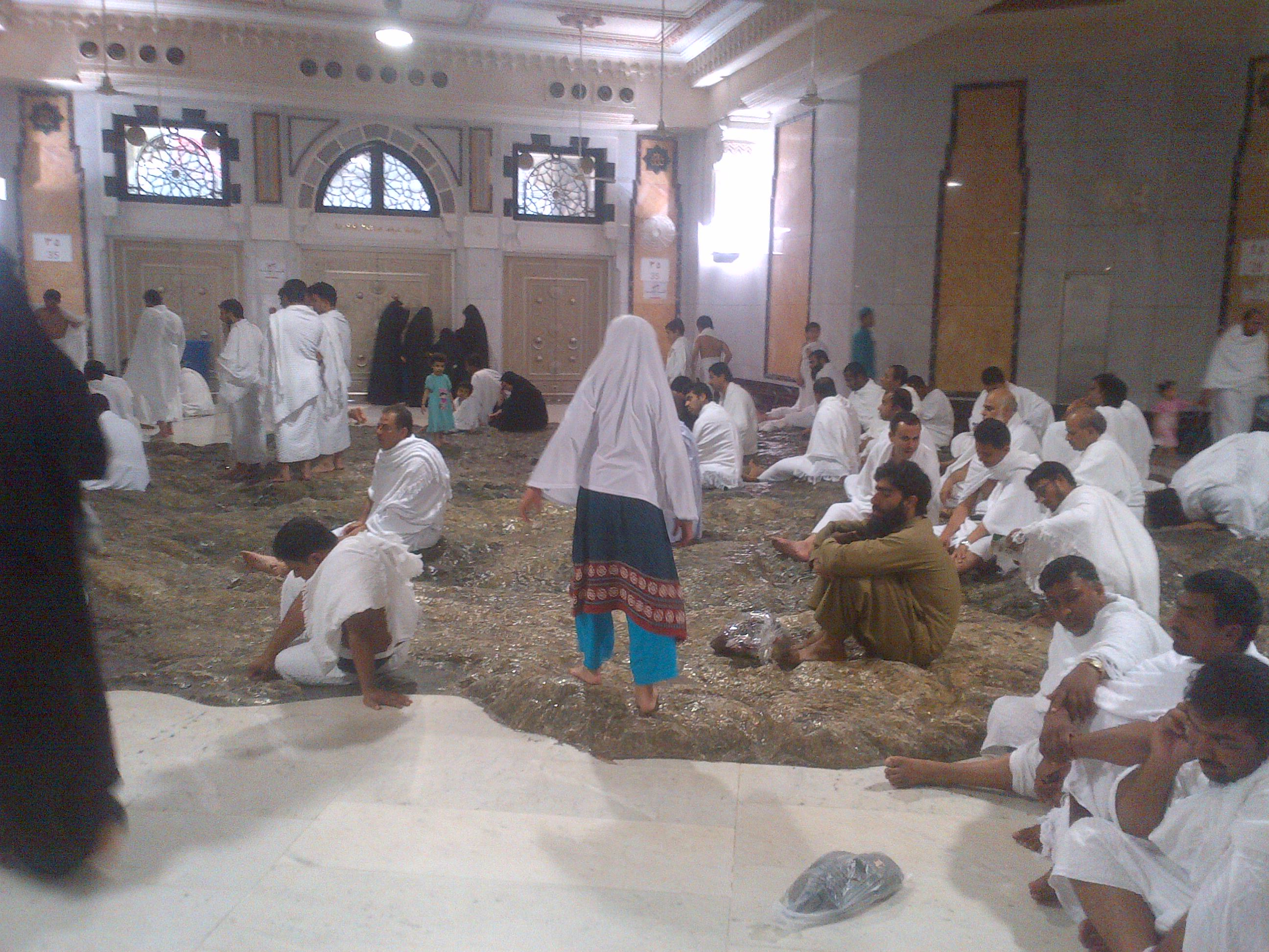 Bukit Marwah, bukit yang merupakan tempat untuk menunaikan ibadah sa'i (berjalan kaki dan berlari-lari kecil dari Bukit Shafa ke Bukit Marwah 7 kali)